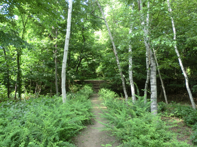 北大植物園の白樺です。